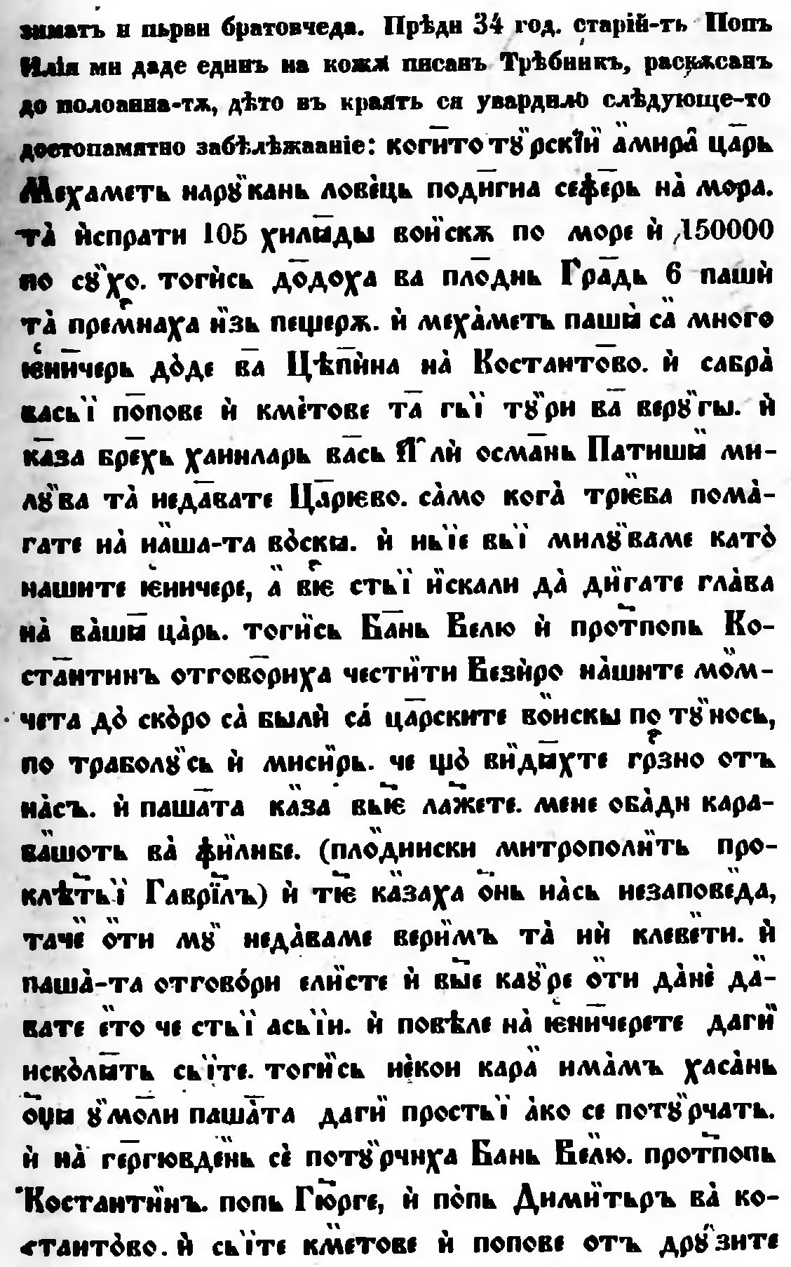 Летописна хроника на поп Методий Драгинов, публикувана в 1870 г в "Географико историко статистическо описание на Татар Пазарджишка кааза" от Ст. Захариев.